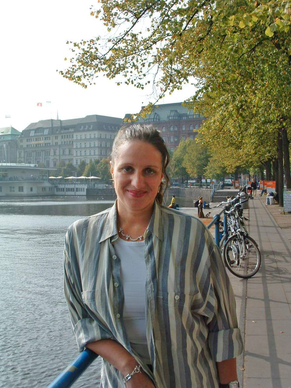 Die deutsche Journalistin Bettina Röhl